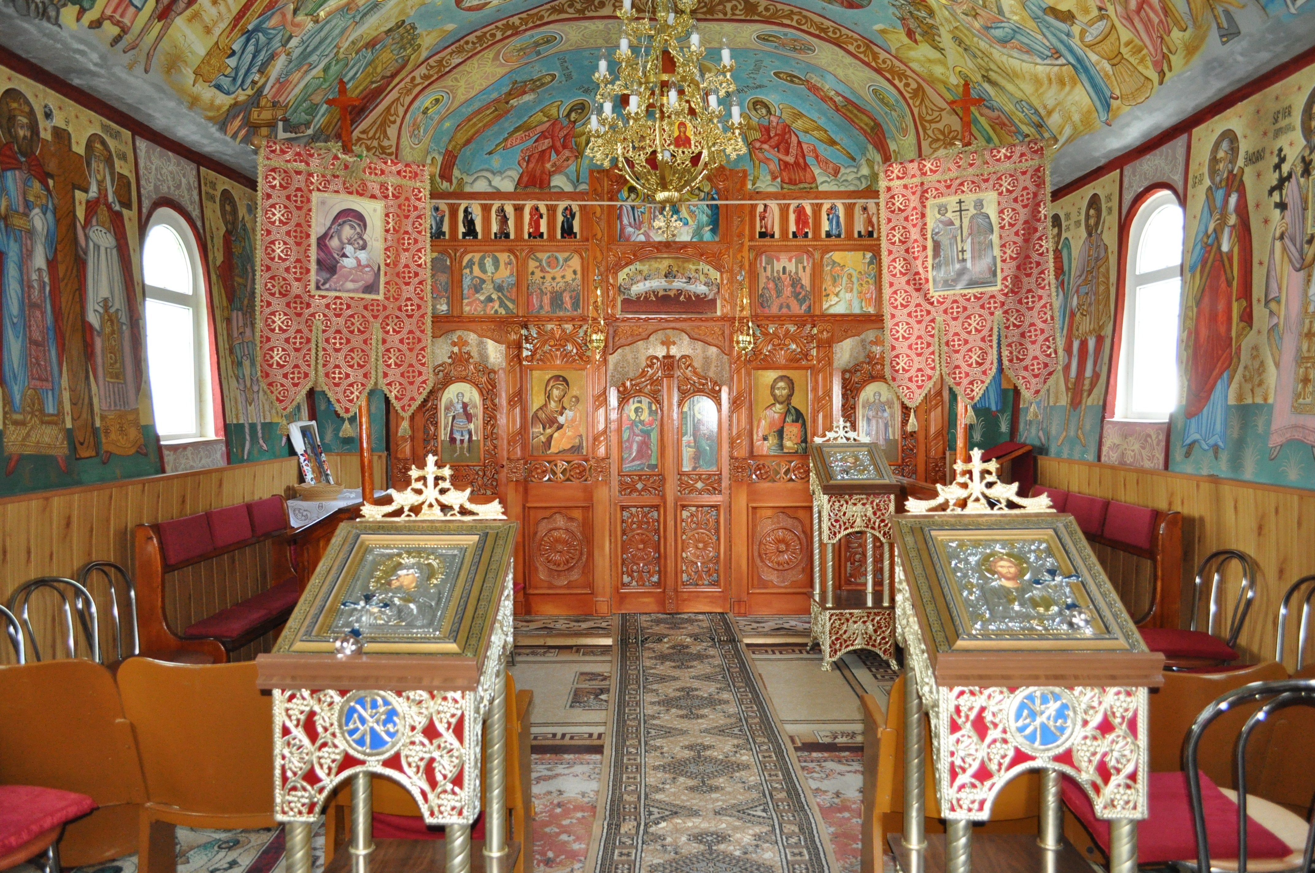 Biserica de lemn „Sfânta Treime” din satul Pădureni, comuna Mintiu Gherlii, județul Cluj